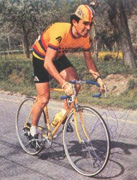 Postal promocional Intercontinentale Assicurazioni - Leonardo Natale, 1978